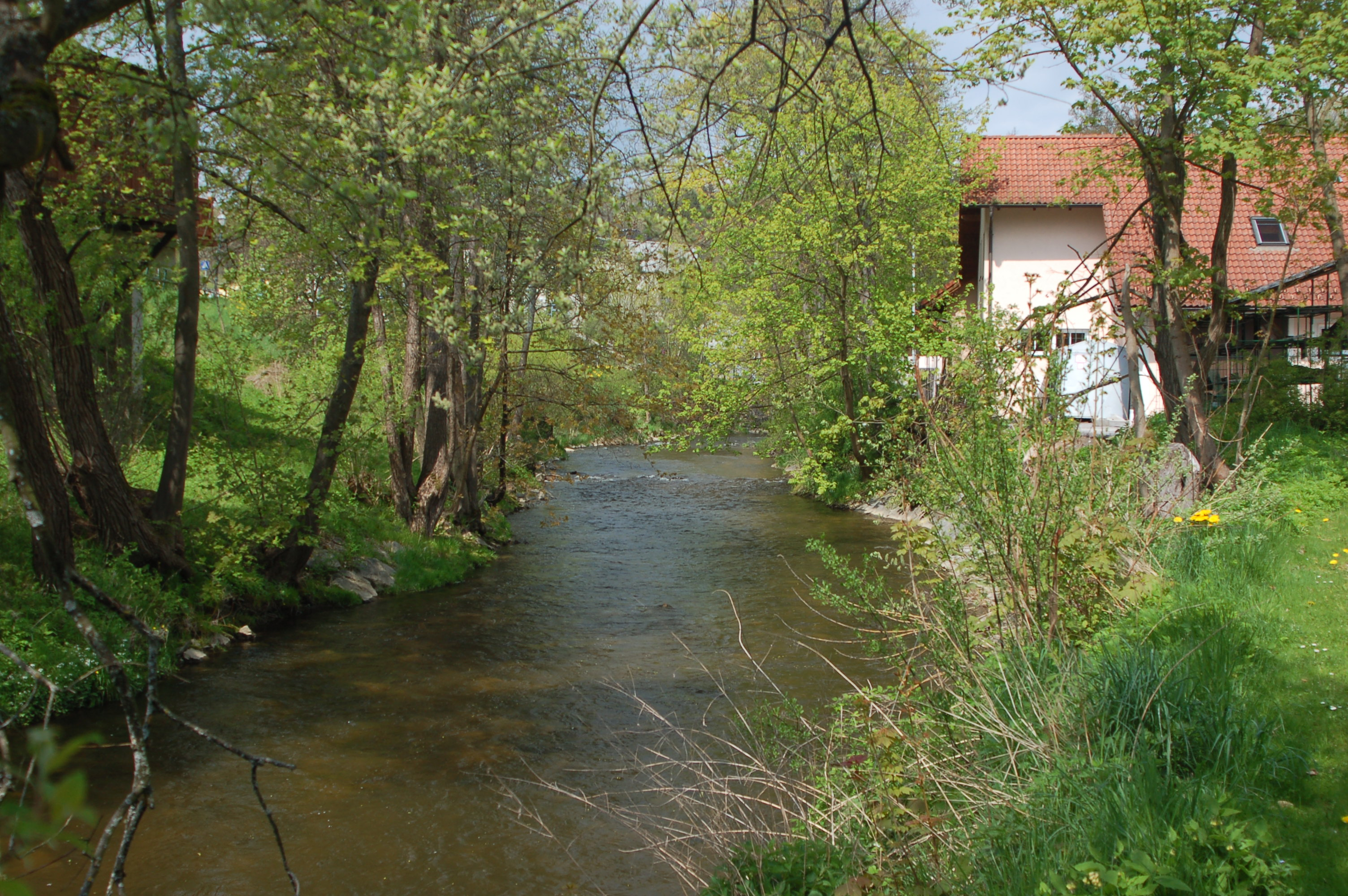 Die Zwettl an der Stadtmauer der Stadt Zwettl